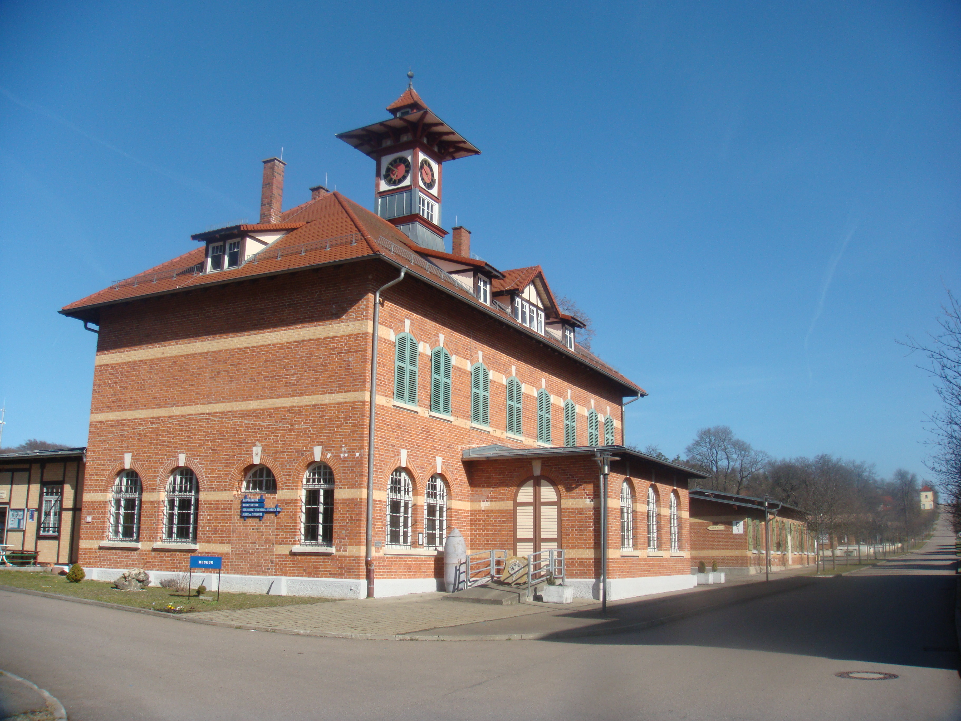 Altes Postgebäude, heute Lagermuseum